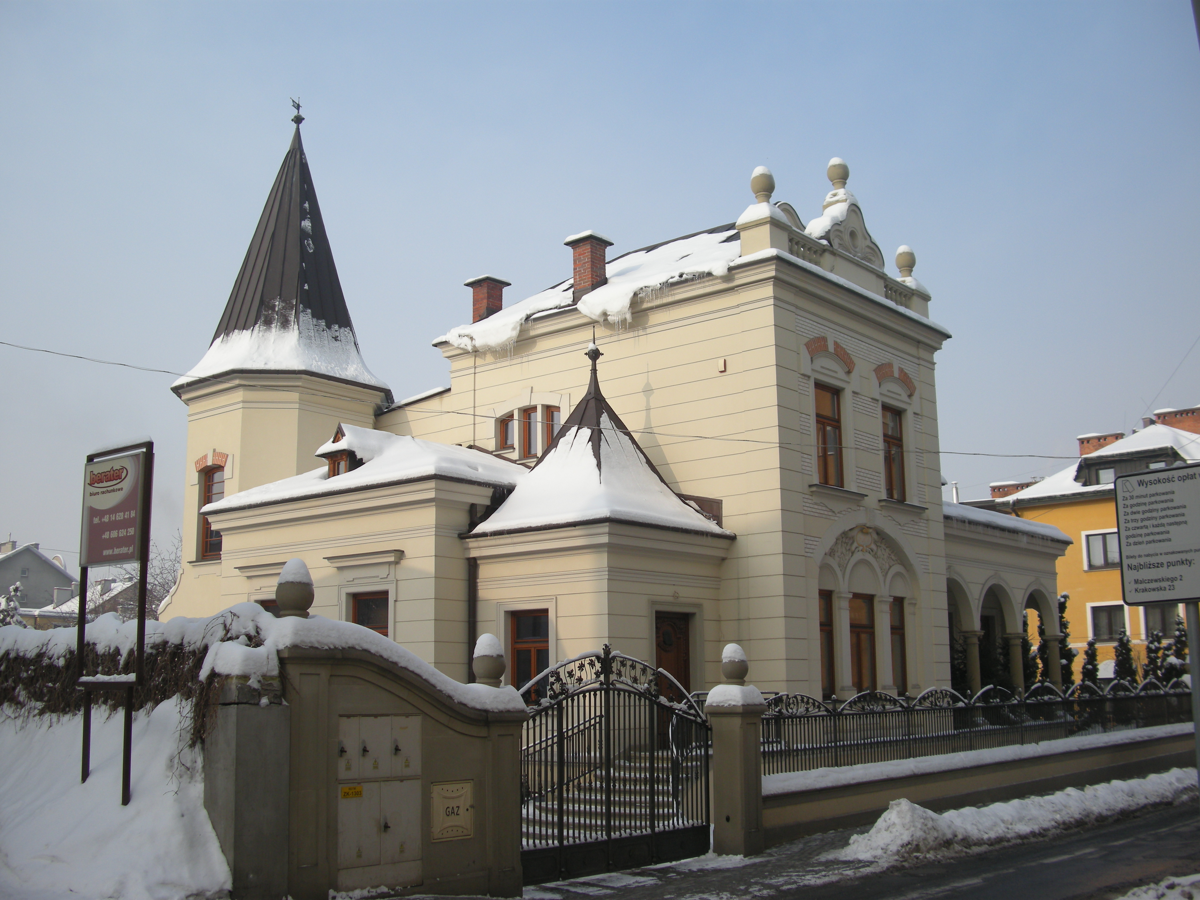 Willa z przełomu wieków XIX i XX przy ul. J. Malczewskiego